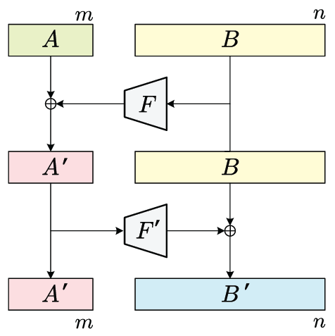 רשת פייסטל כללית מתחלפת